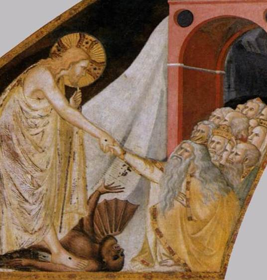 Discesa agli Inferi (dettaglio)